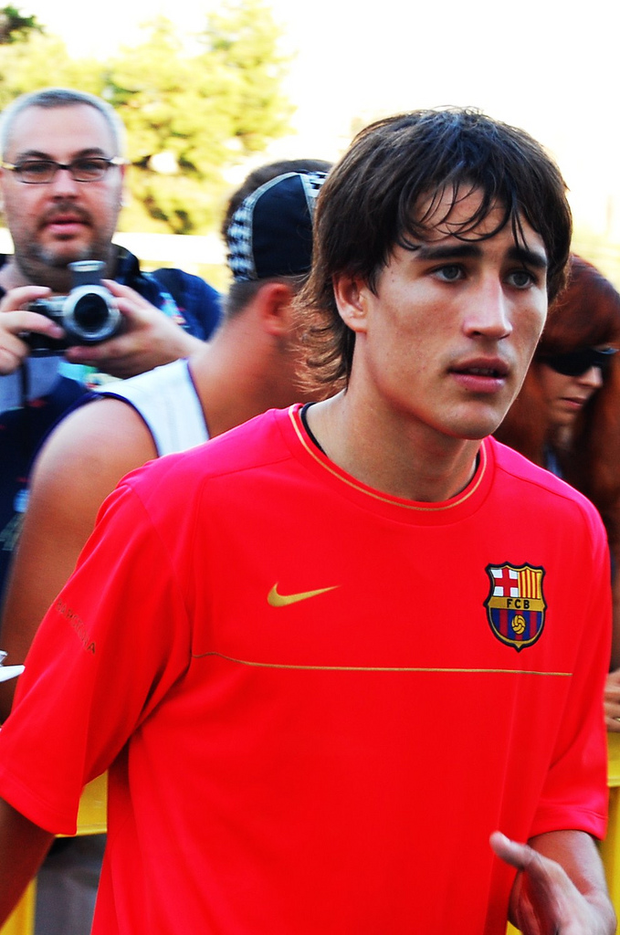 Barcelona - Espania